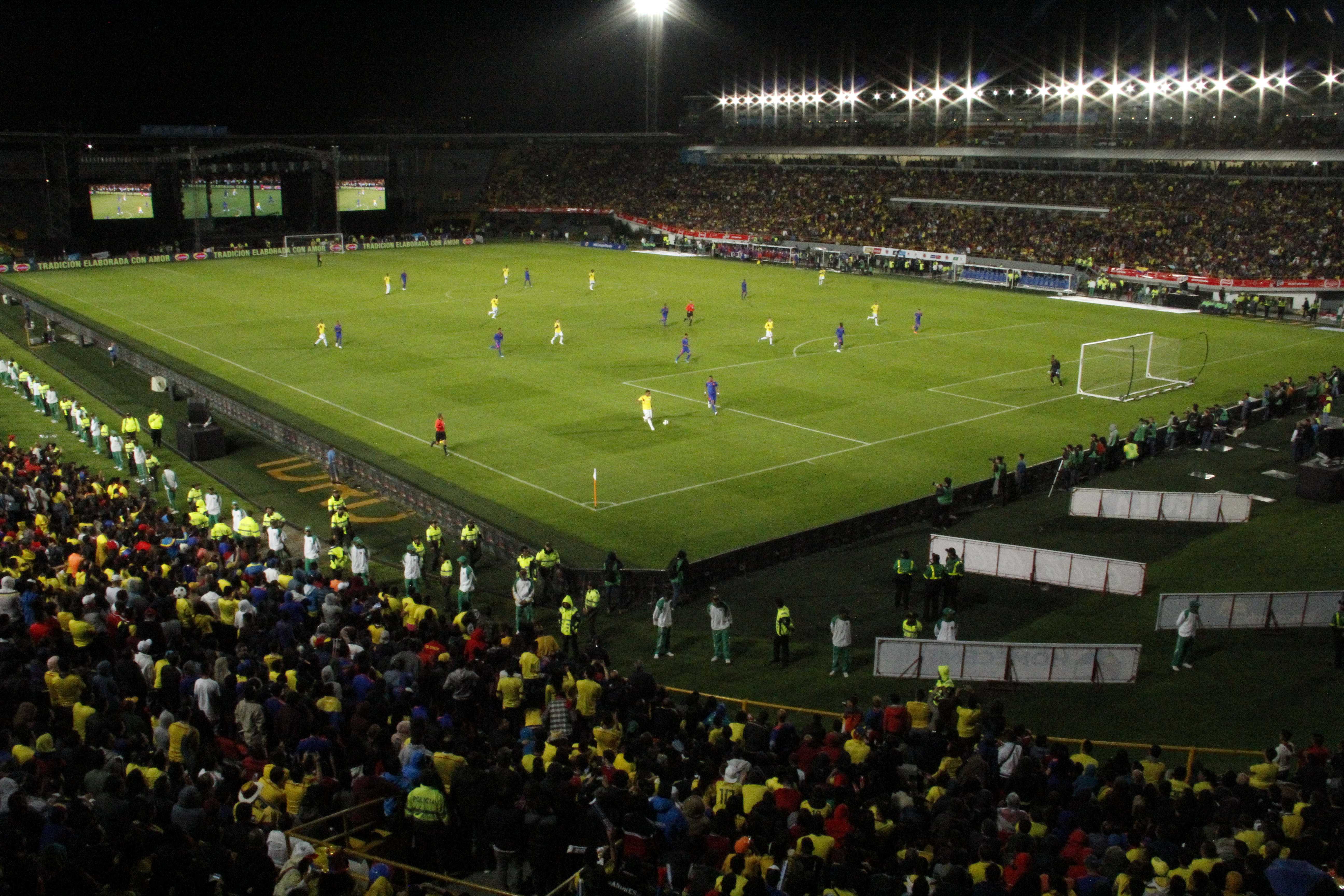 Estadio el campin PH: Jose Luis Onofre Soto